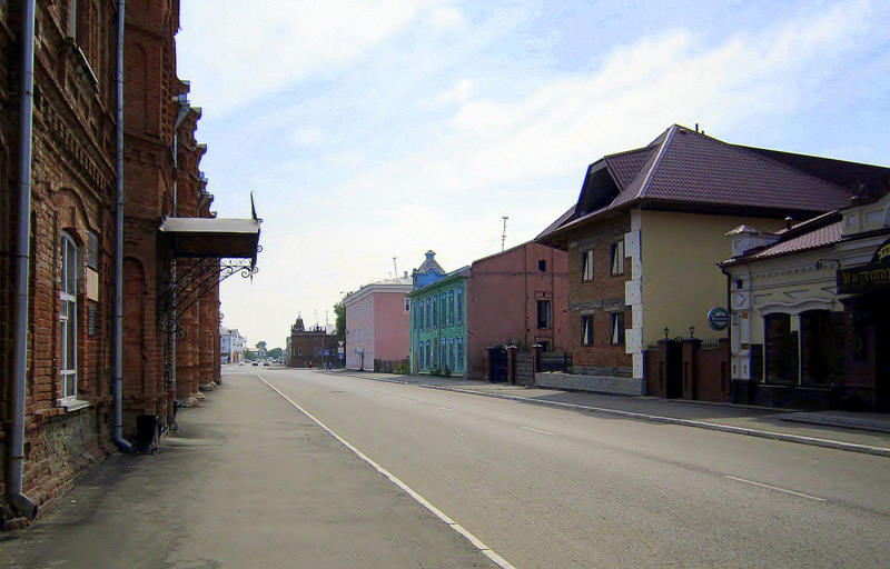 Бийск. Советская улица. Вид на запад.